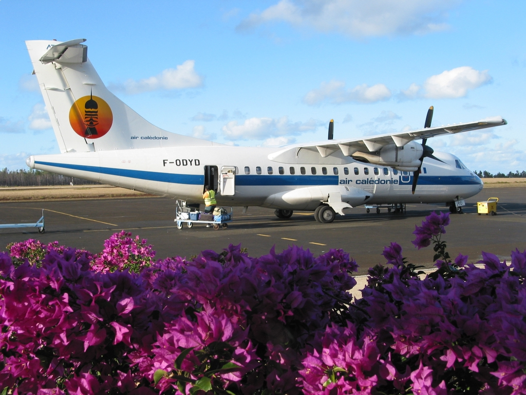 ATR-42 d'Air Calédonie (F-ODYD), au chargement à l'aérodrôme provincial de Moue Iles Des Pins.